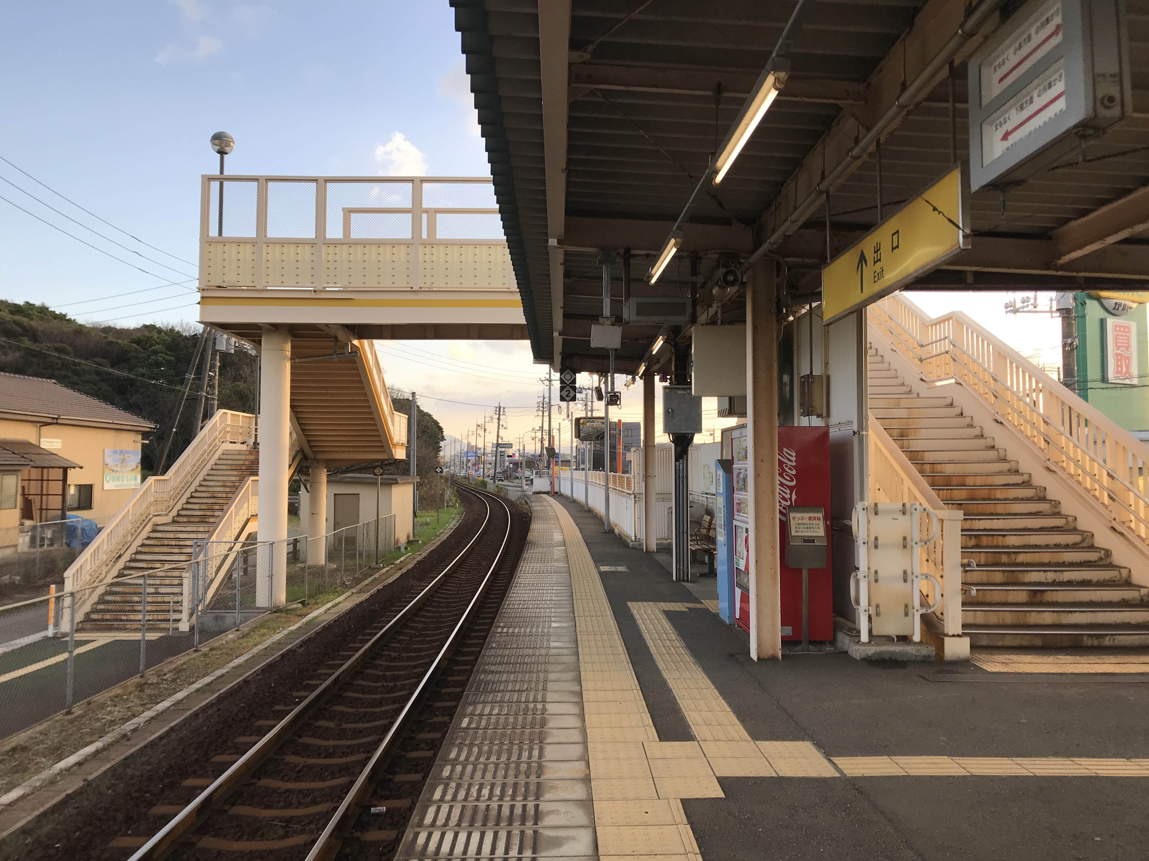 梶栗郷台地駅のホーム(奥は綾羅木方面)